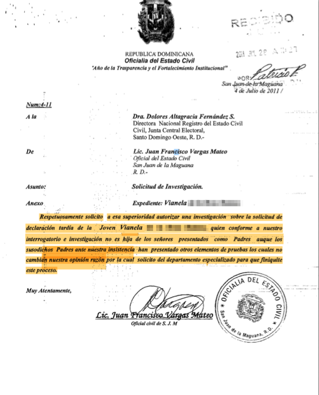 Ejemplo discriminación informes inspectoría JCE 2